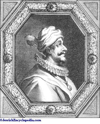 Shabbatai Tzeví